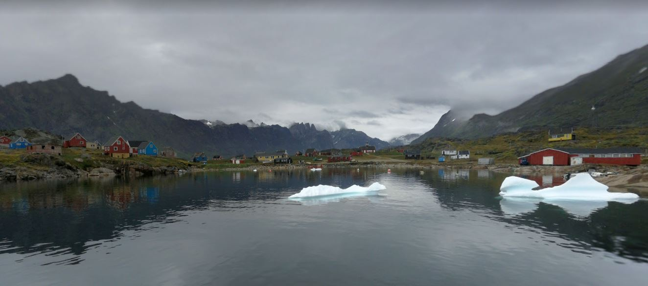 Narsarmijit